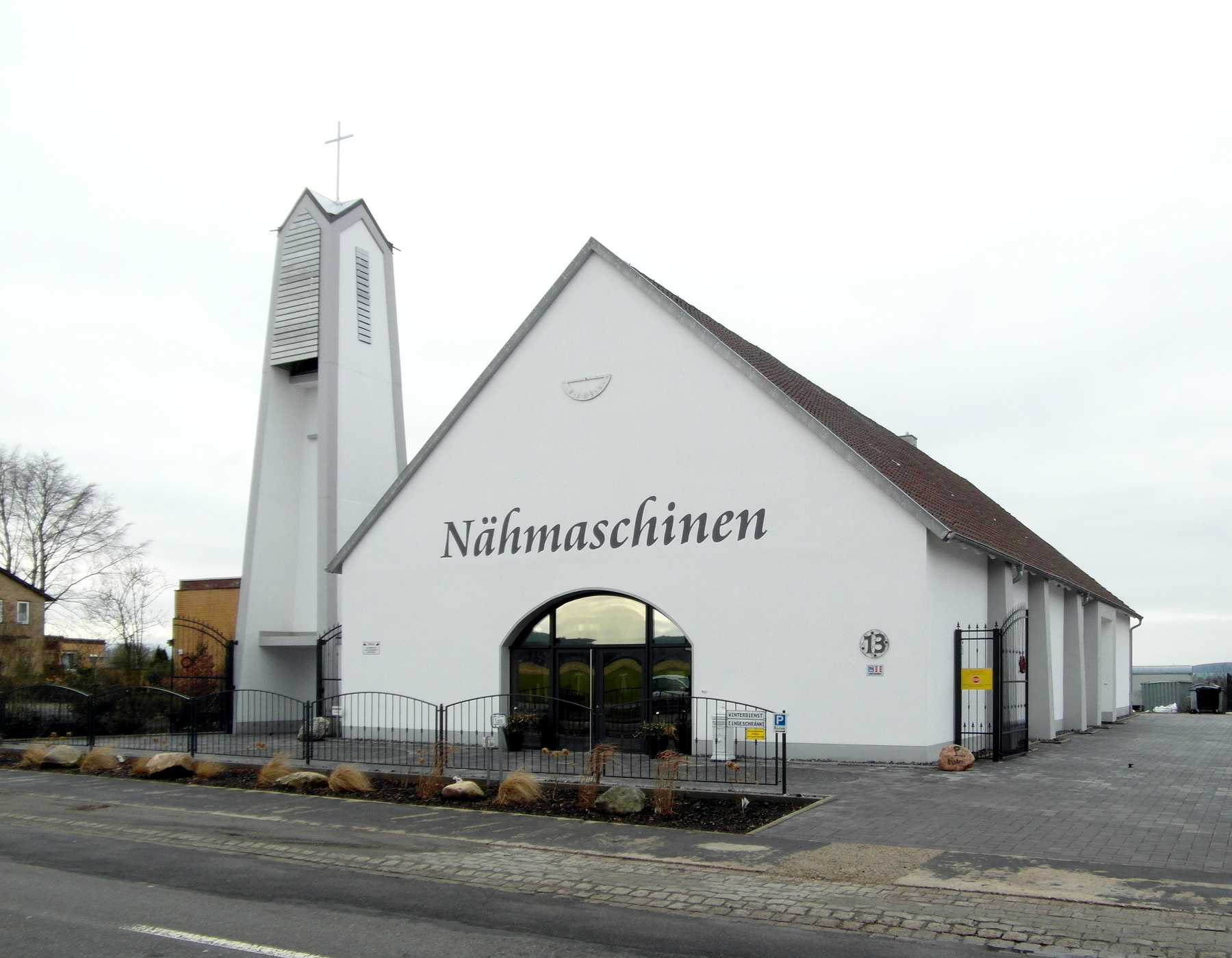 Die 1960-62 durch Umbau einer Scheune entstandenen katholischen Kirche St. Christophorus im Wennigser Ortsteil Holtensen in der Region Hannover wird nach Schließung und Profanierung seit 2015 von einem Nähmaschinenvertrieb genutzt.